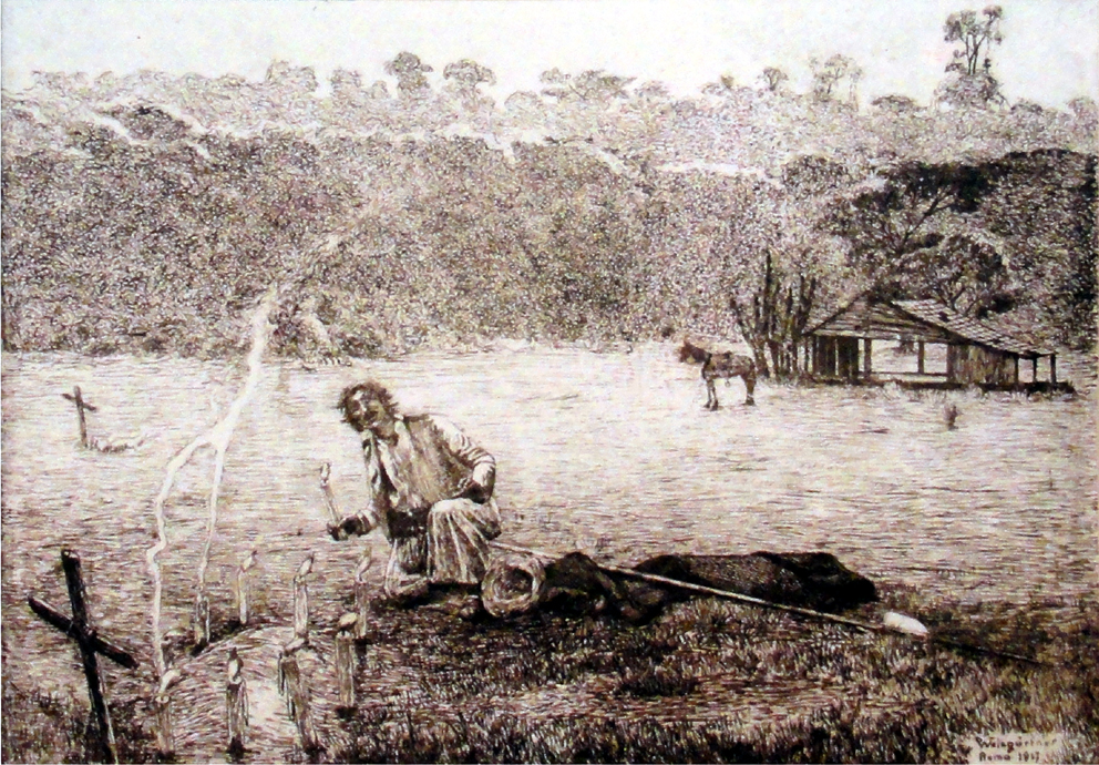 Remorsos. Gravura em metal, 21x29,5cm